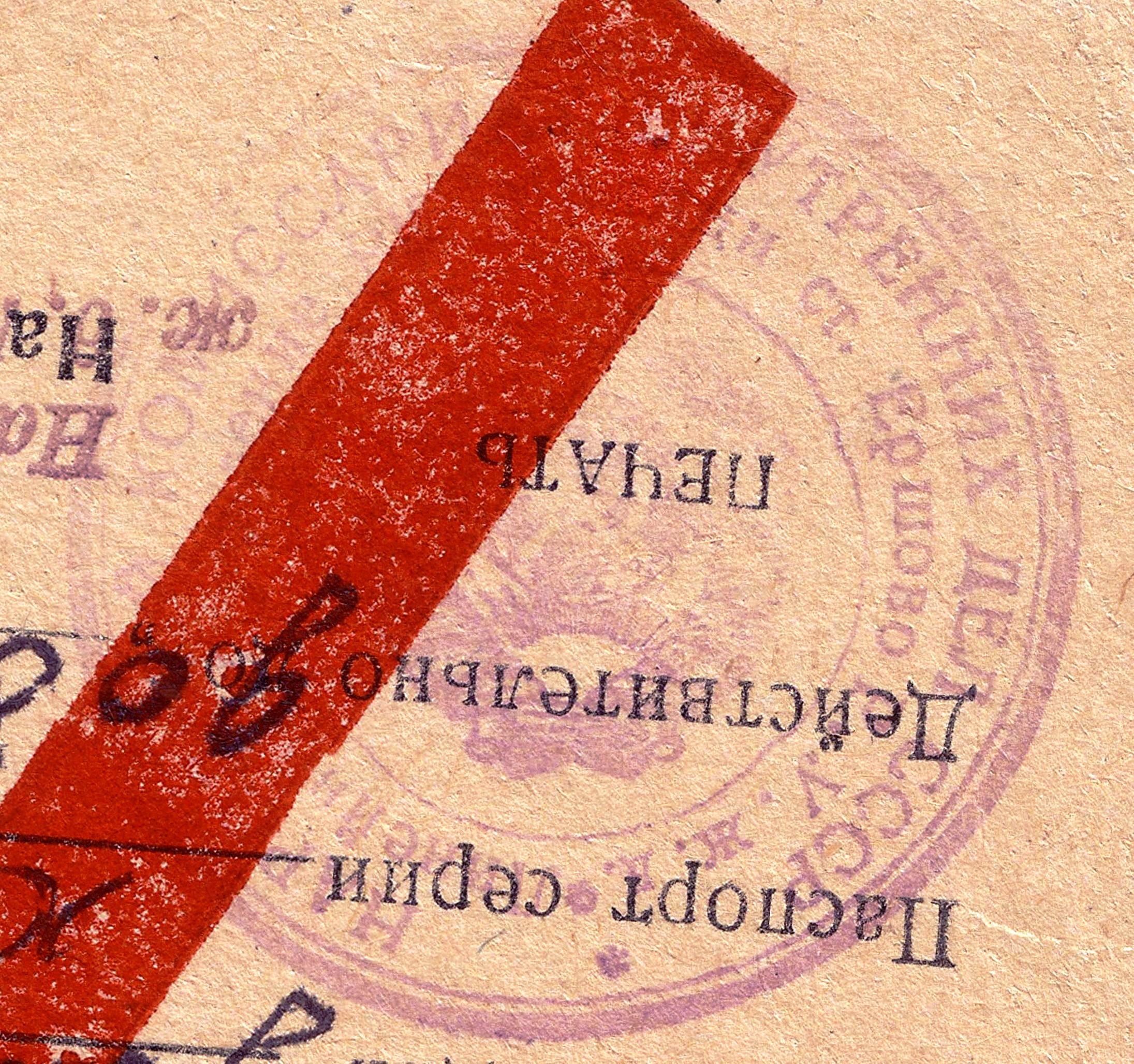 НКВД СССР. Дорожный отдел рабоче-крестьянской милиции на станции Ершов (станция) Саратовской области Рязано-Уральской железной дороги. Печать на пропуске для проезда в освобождённую Харьковскую область (Южная железная дорога).